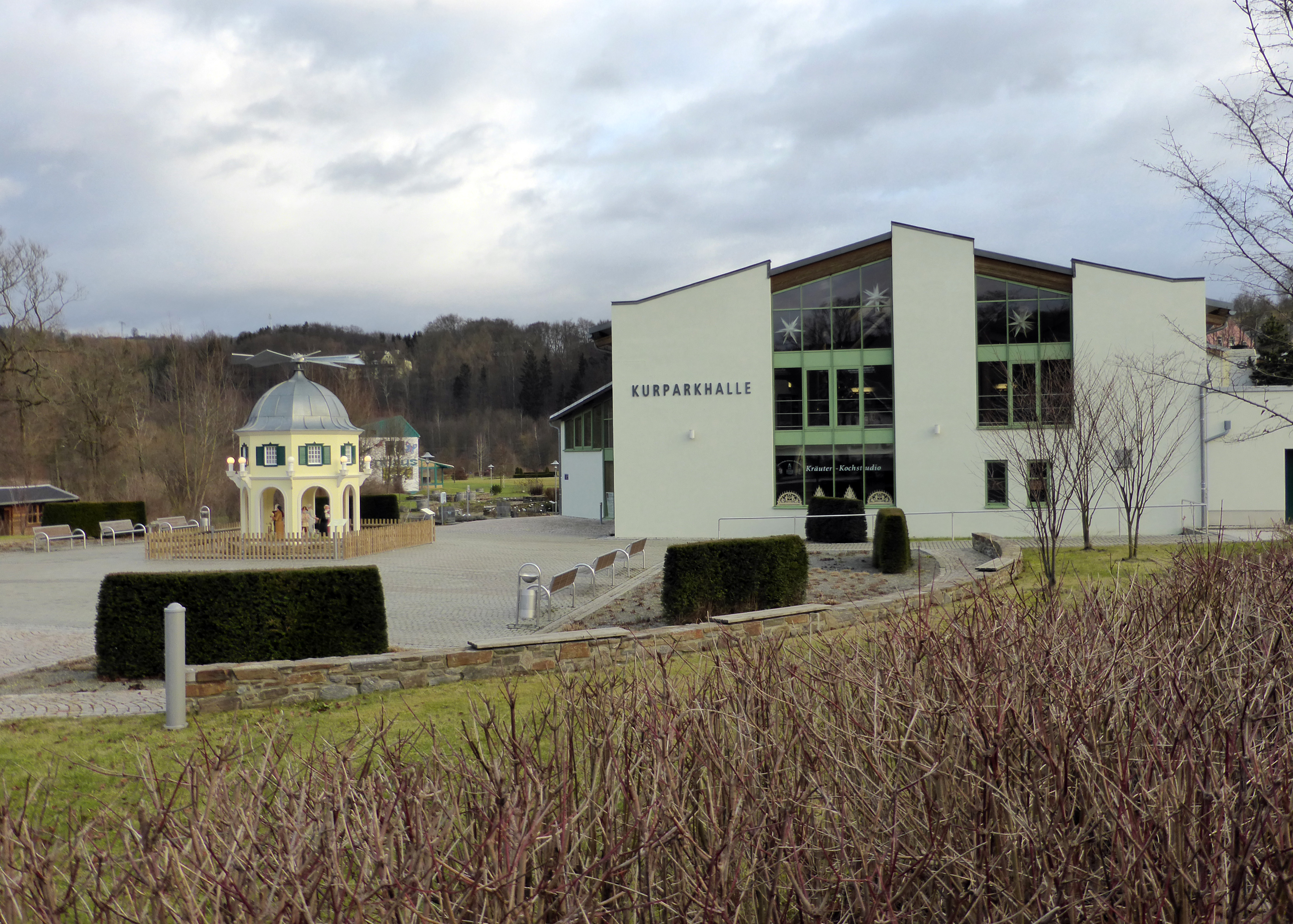 Kurparkhalle und Ortspyramide in Thermalbad Wiesenbad, Erzgebirgskreis - Sachsen.